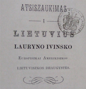 Proclamation under Laurynas Ivinskis' name